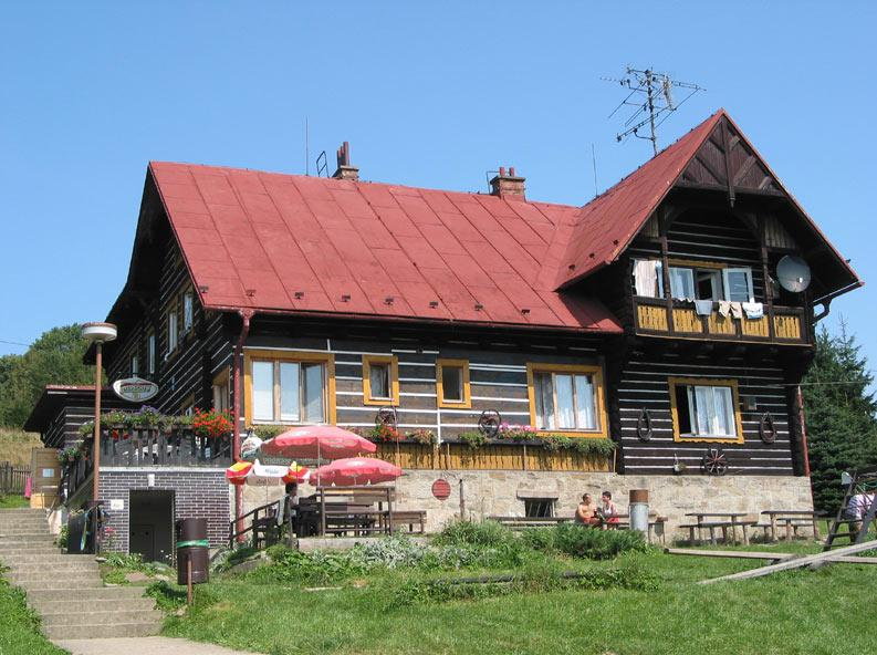 Česky: Horská chata Studeničné